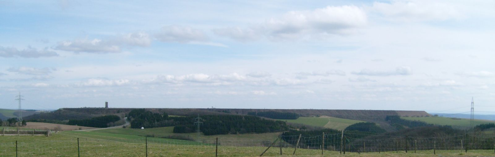 De Niklosbierg vum Groesteen aus gesin.